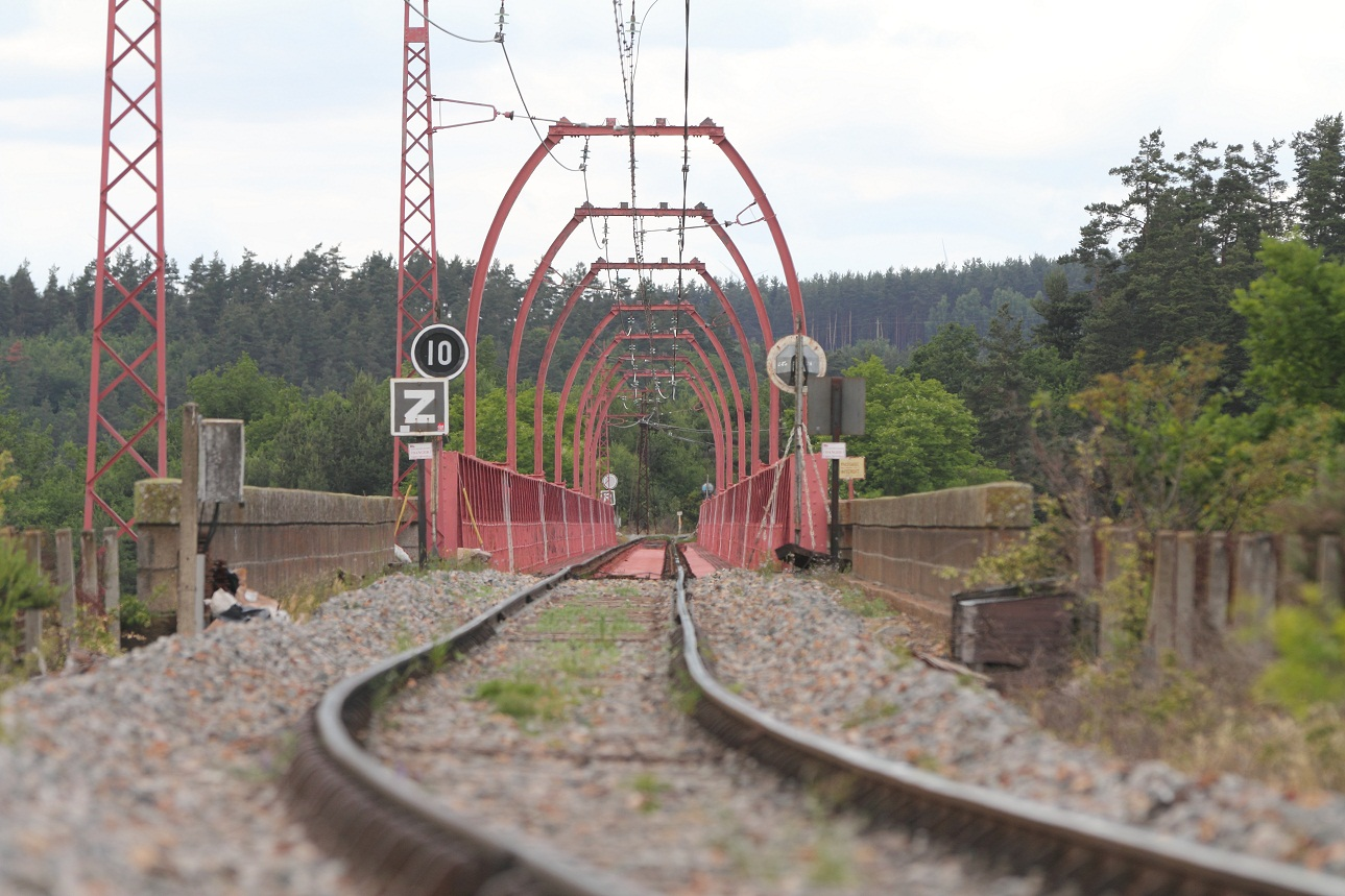 Vue de l'entrée du viaduc de Garabit côté sud en juin 2011, Cantal, France.